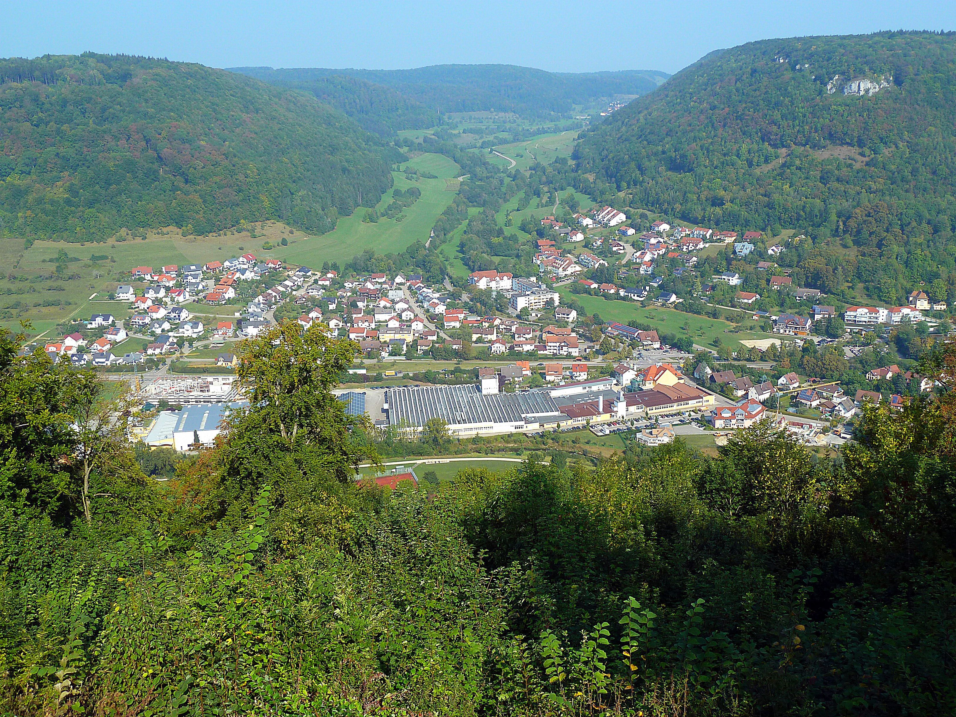 Blick von der Hiltenburg auf Bad Ditzenbach